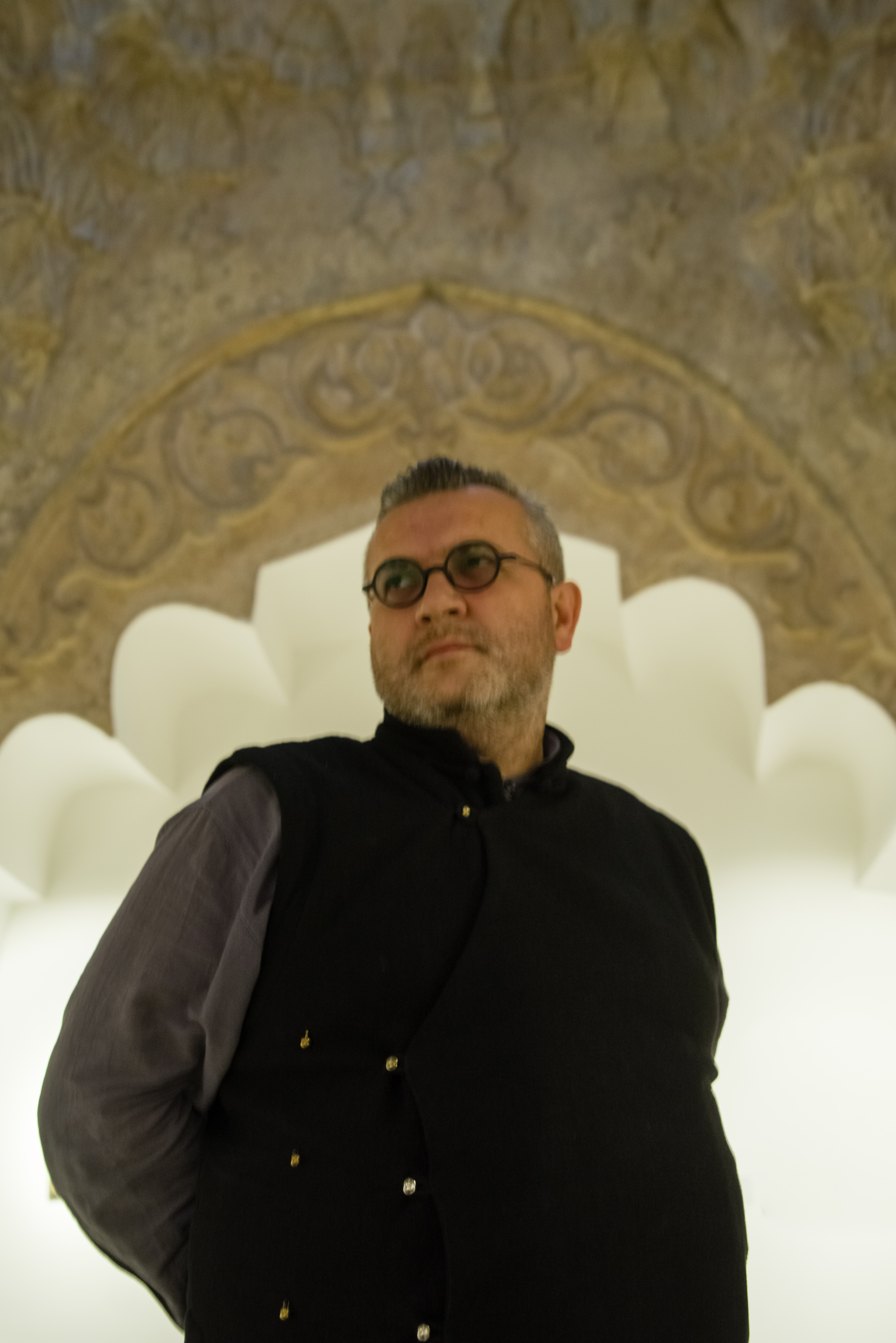 Portret i Fahredin Shehut